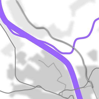 Dieses Bild ist eine Karte der Stadtbahn Bonn beziehungsweise des geplanten Teilstücks von Beuel über Niederkassel nach Zündorf.